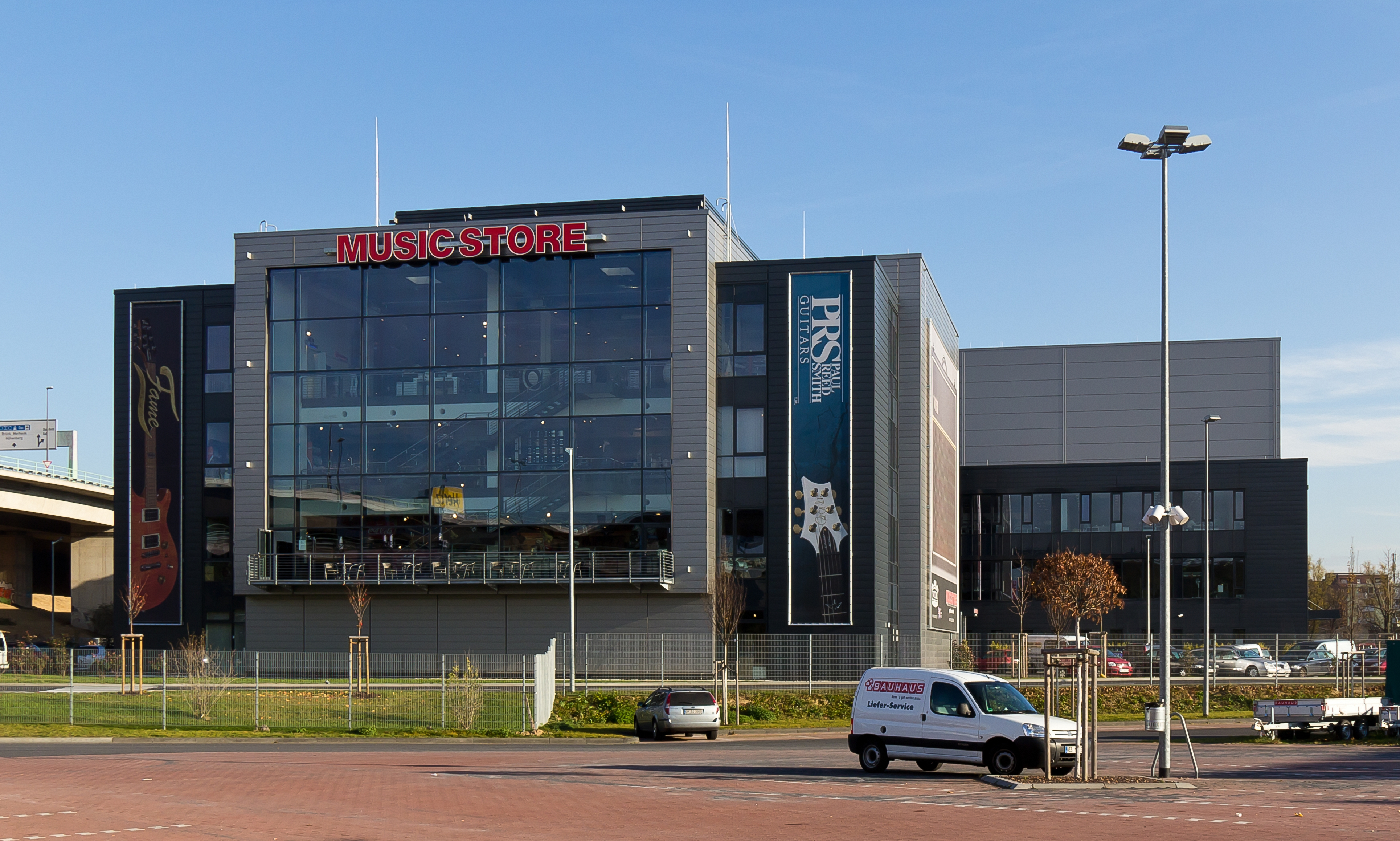 Firmenzentrale des Music Store in einem Neubau in Köln-Kalk. Baujahr: 2010/11